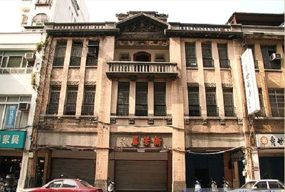 中文（台灣）: 新芳春茶行，位於臺北市大同區民生西路309號。